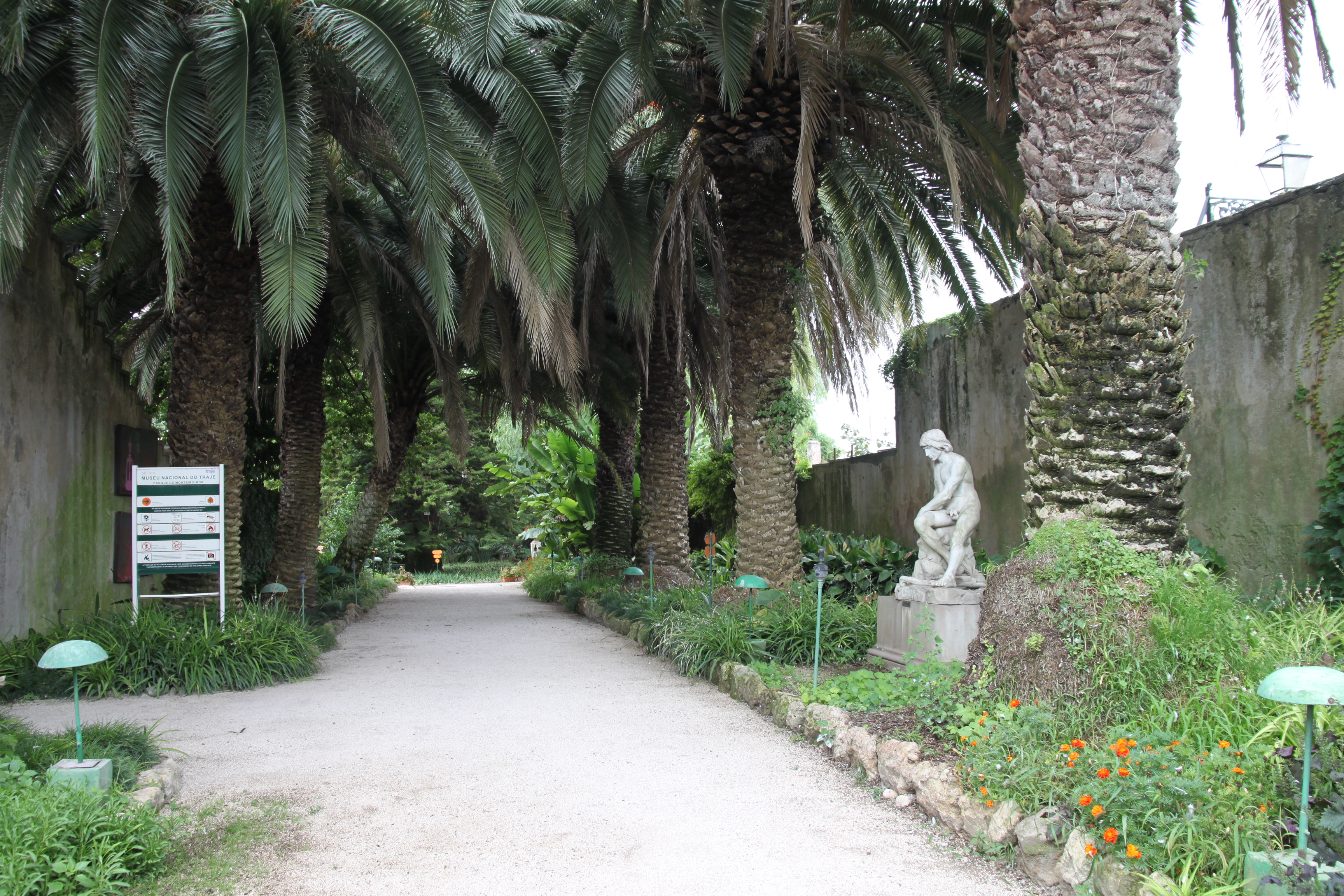 Palácio do Monteiro-Mor This file was uploaded for Wiki Loves Monuments in Portugal with the unique identifier 74720.